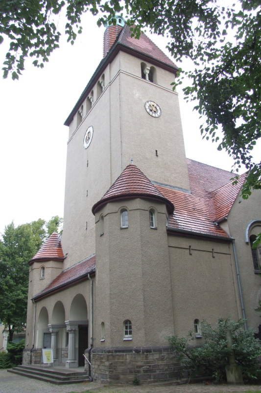 Dorfkirche in Berlin-Tegel Fotograf: Harald Rossa Datum: August 2006 Höher aufgelöste Version ist verfügbar